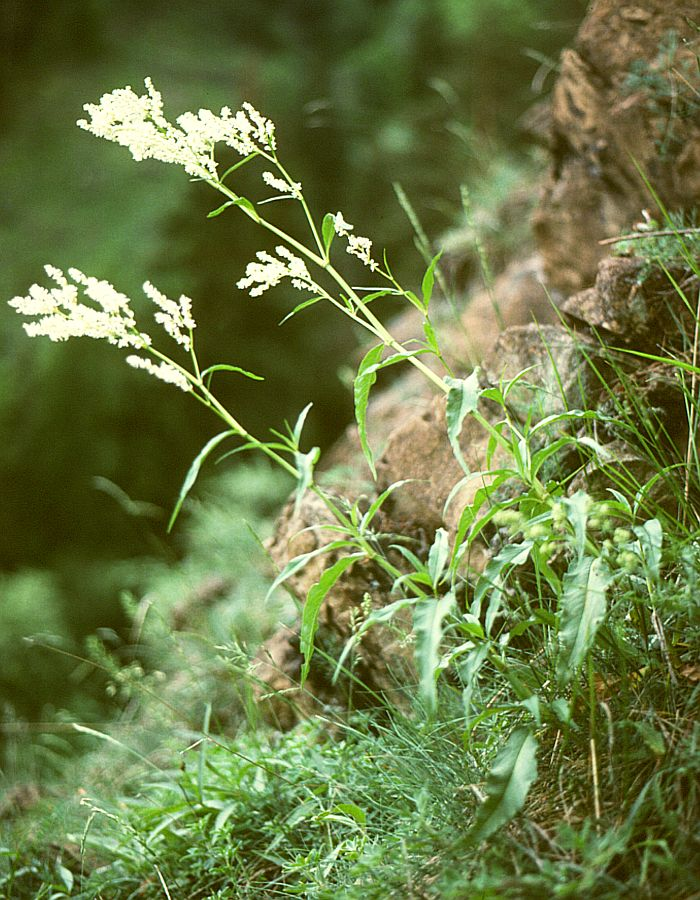 Alpen-Knöterich (Persicaria alpina), Knöterichgewächse (Polygonaceae) - Österreich/Austria/Autriche: Steiermark, Murtal N Graz, Kirchkogel bei Pernegg, auf Serpentinit